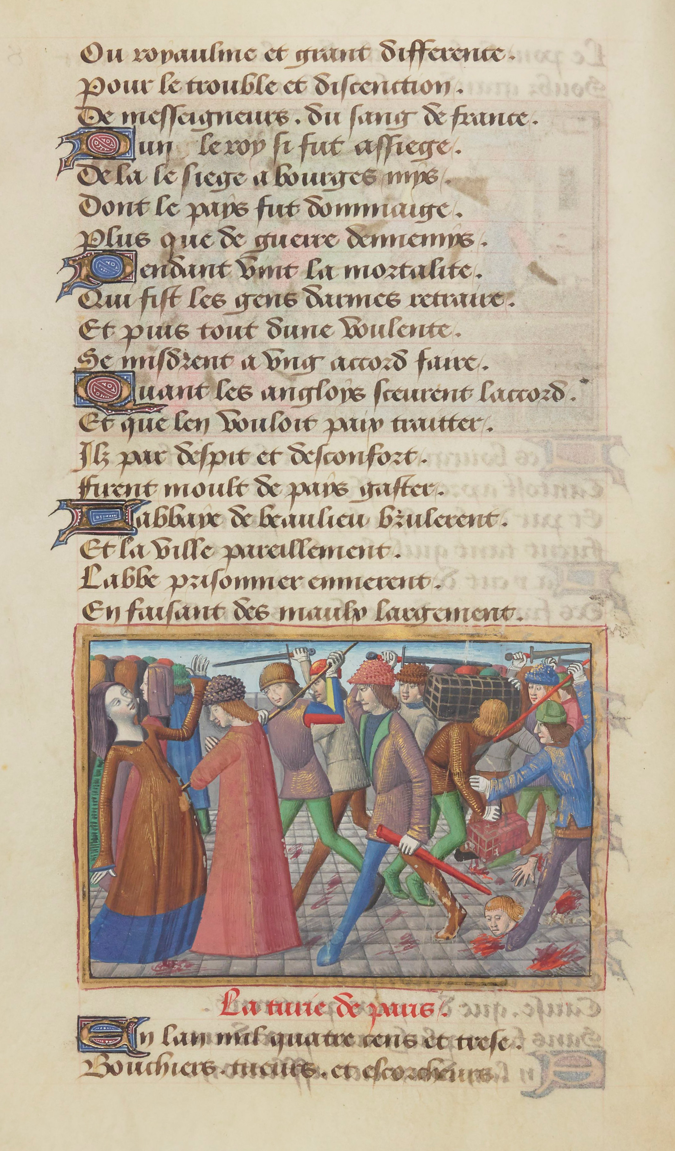 Massacre des habitants de Paris en 1413.